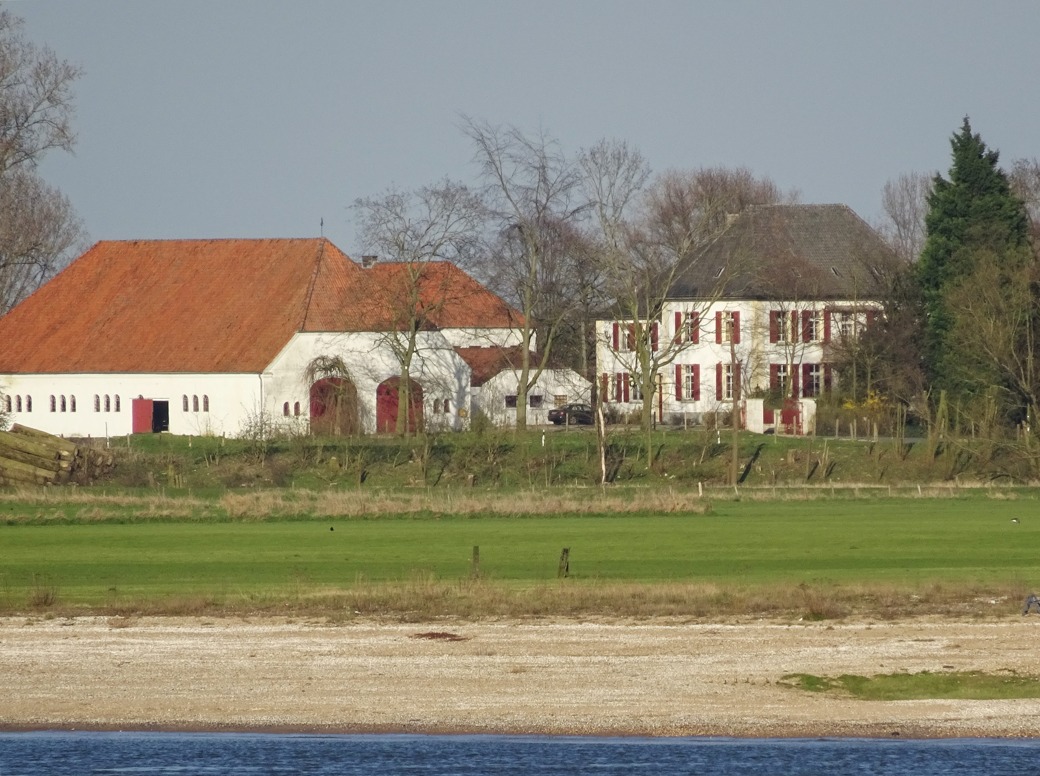 Rees, Reeserward 7 gesehen von der Griether Straße in Kalkar